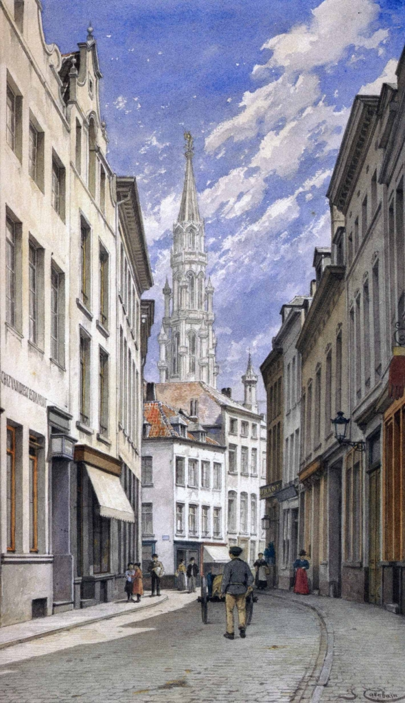 Peinture de Jacques Carabain, ca. 1897 Crayon et aquarelle sur papier Rue de l'étuve